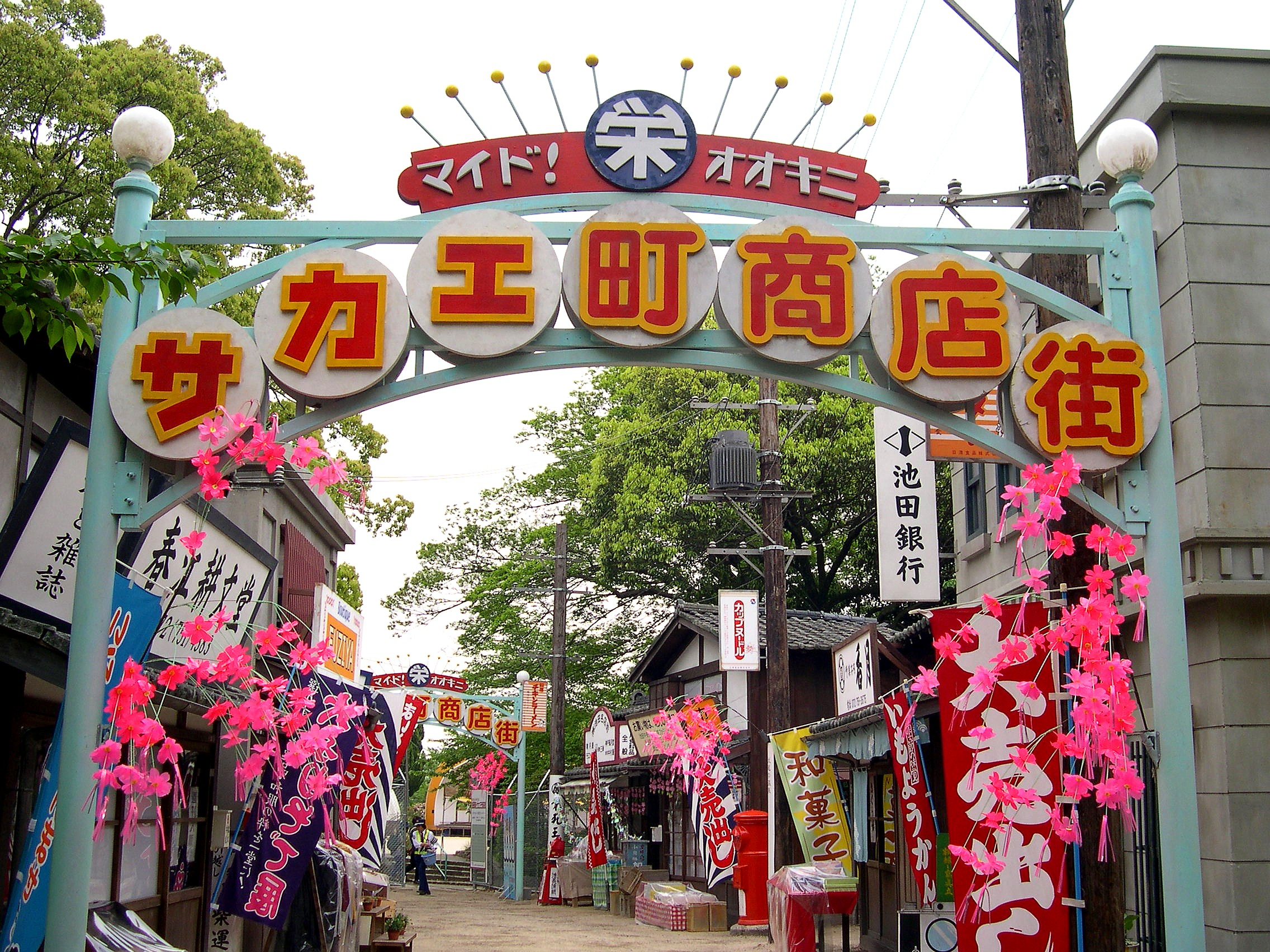 Teruteru1507r.jpg